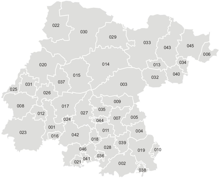 Mapa de los municipios del estado mexicano de Guanajuato